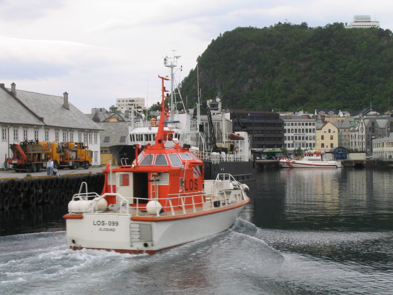 Losbåt på hamna i Ålesund